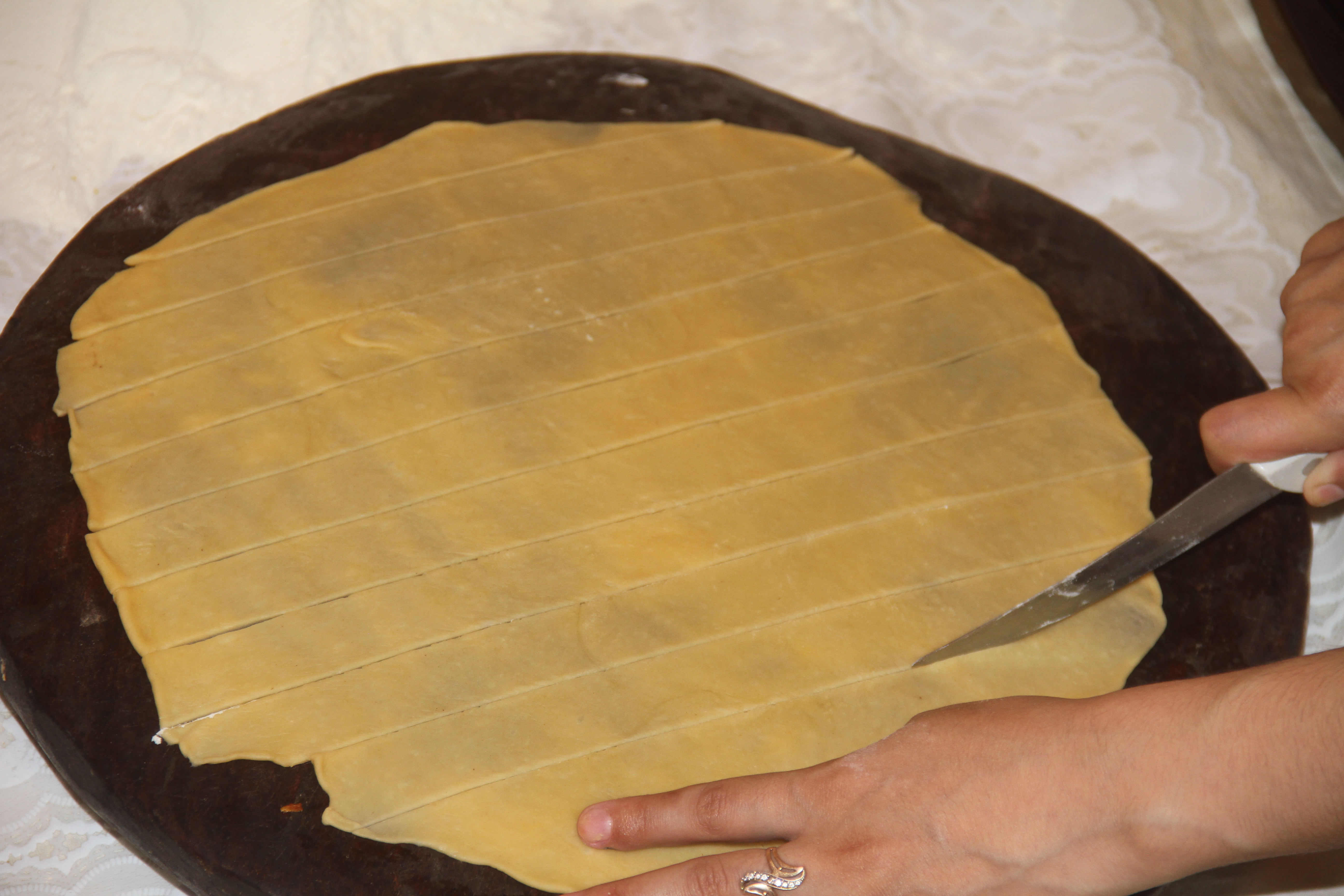 Тоҷикӣ: Чак-чак (5)